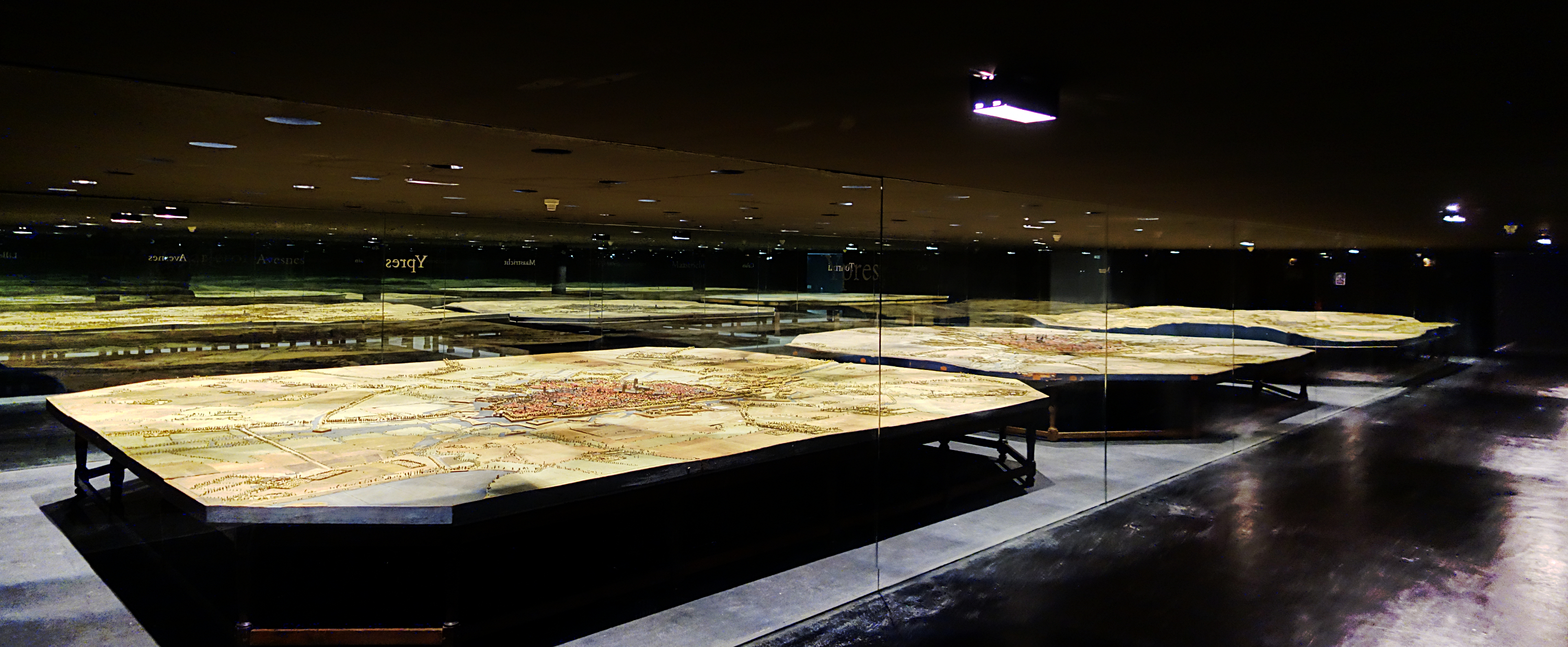 La salle des plans-relief du Palais des beaux-arts de Lille.